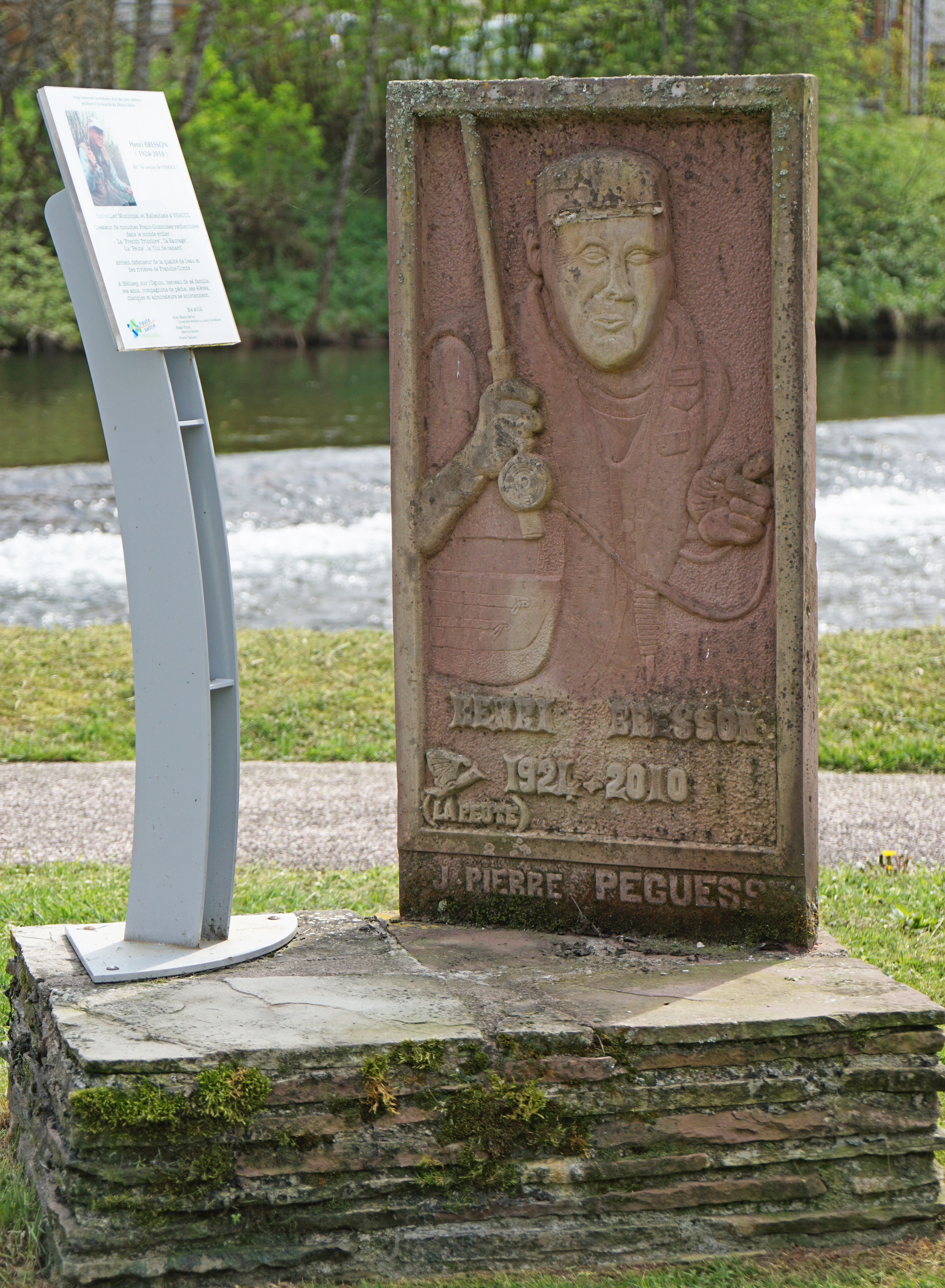 Stèle mémorielle d'Henri Bresson installée près du pont de l'Ognon à Mélisey.